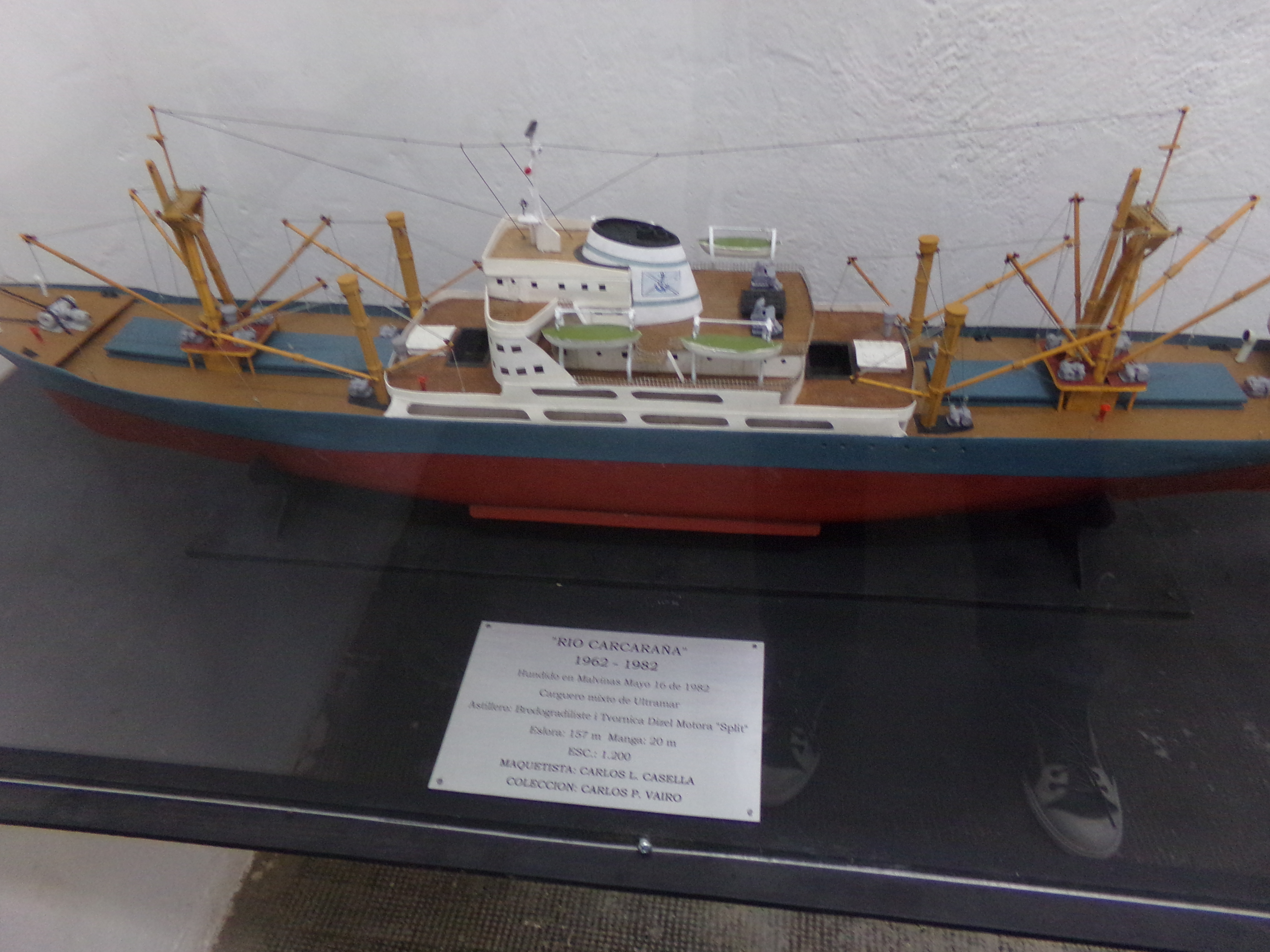 Museo Maritimo y Ex Presidio de Ushuaia, TDF, Arg